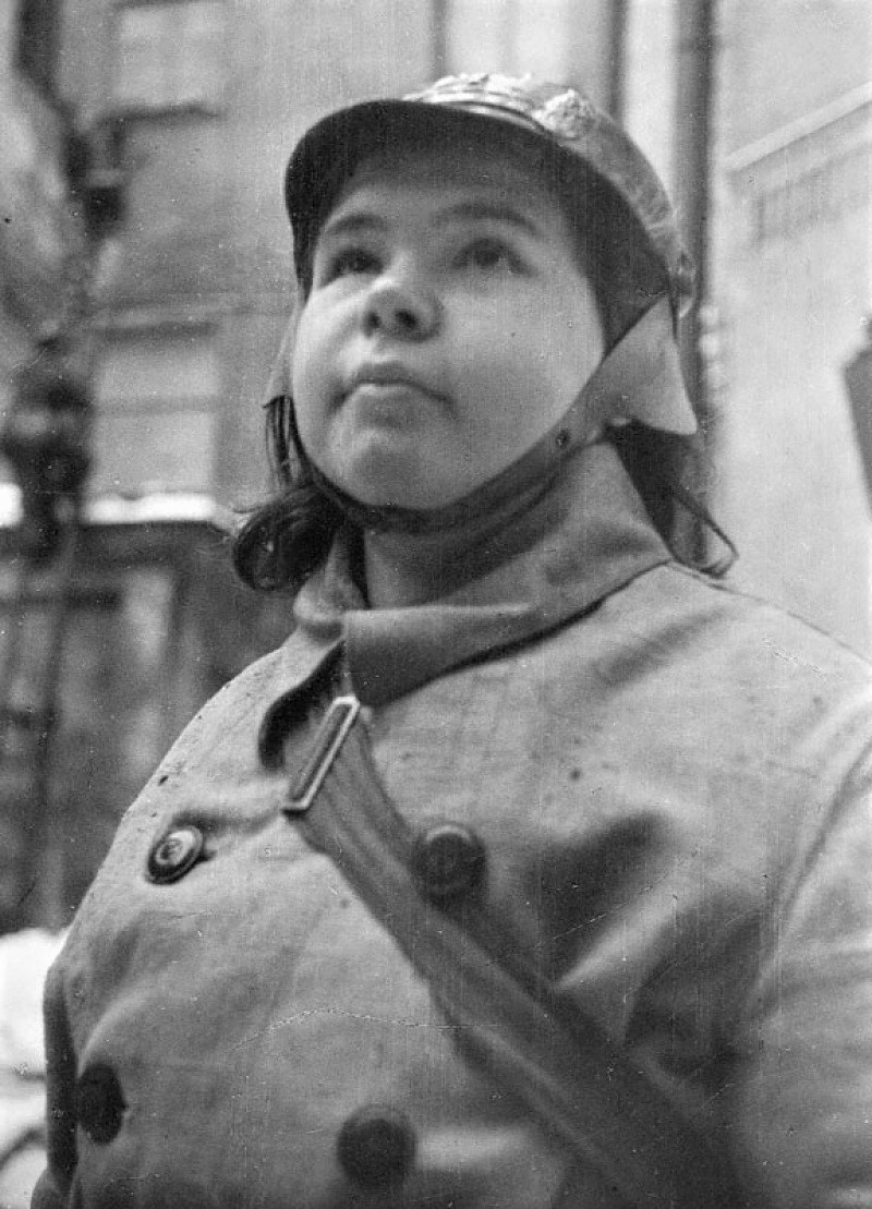 Ленинград блокадный. Командир пожарного взвода Ирина Андреева